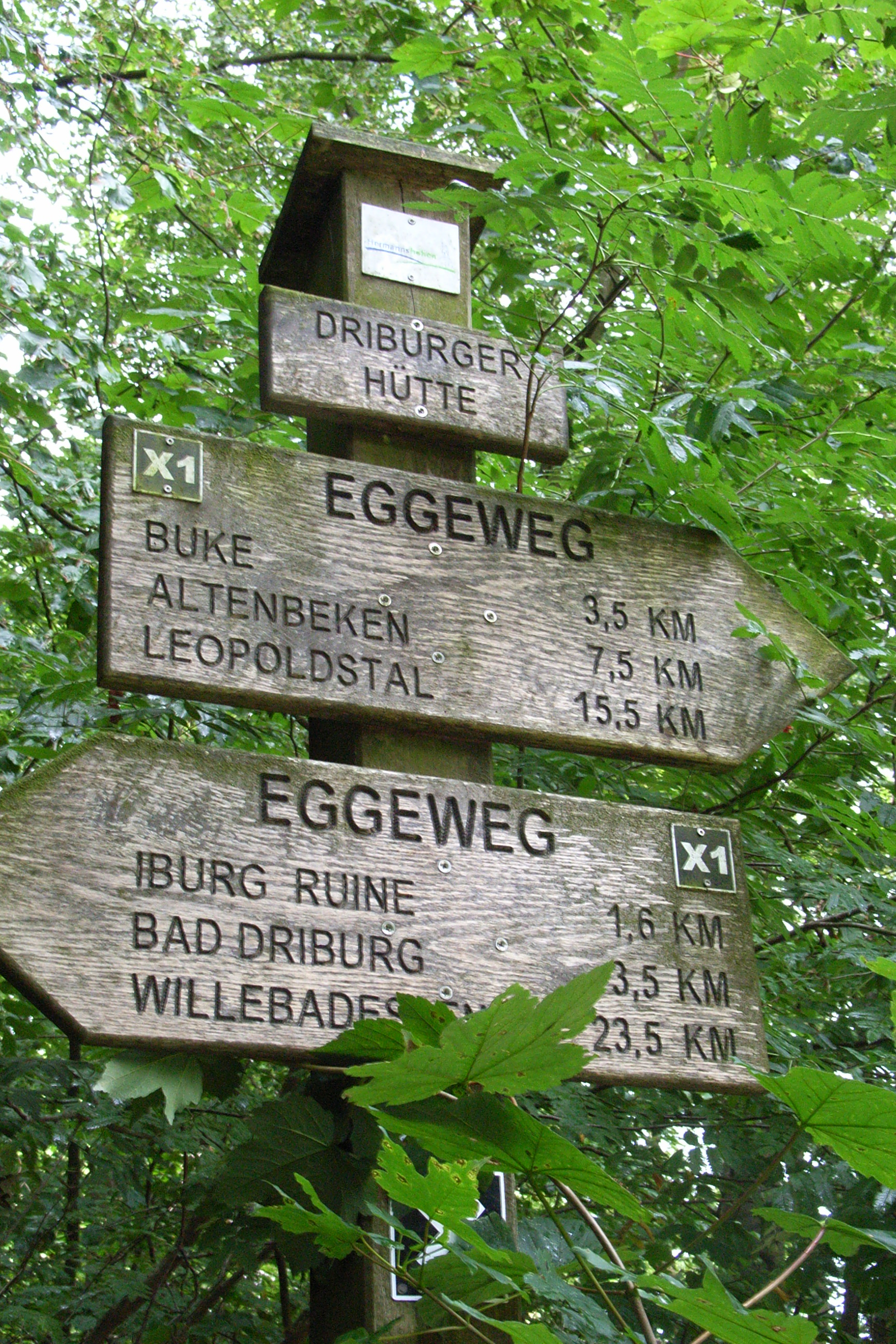 Eggeweg-Wegweiser Driburger Hütte